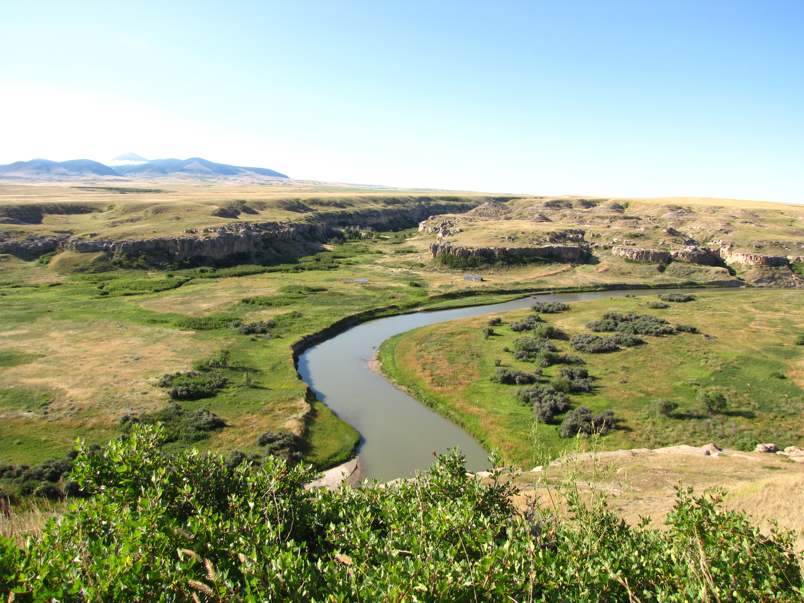 Milk River Valley